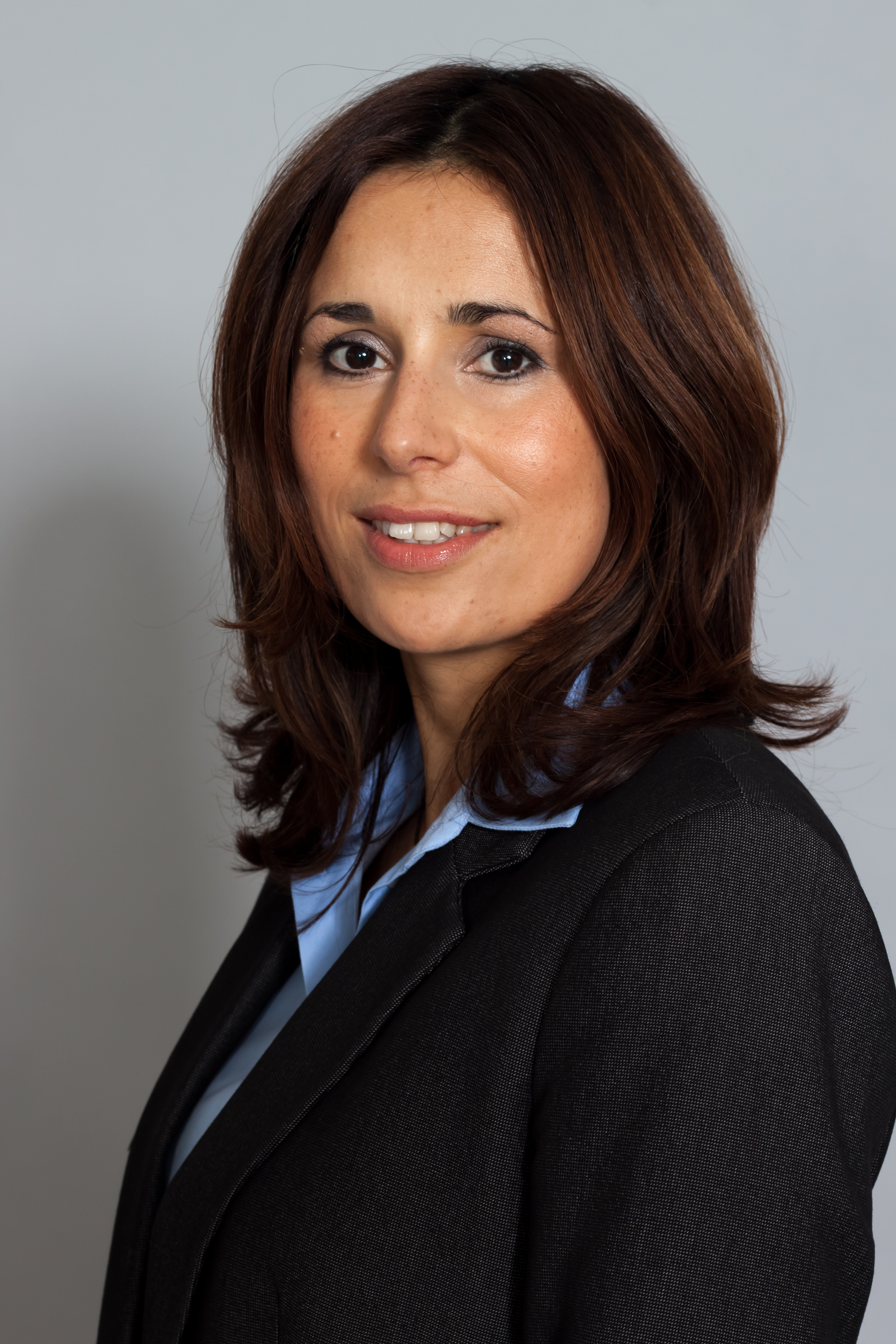 Abgeordnete des Sächsischen Landtages Patricia Wissel